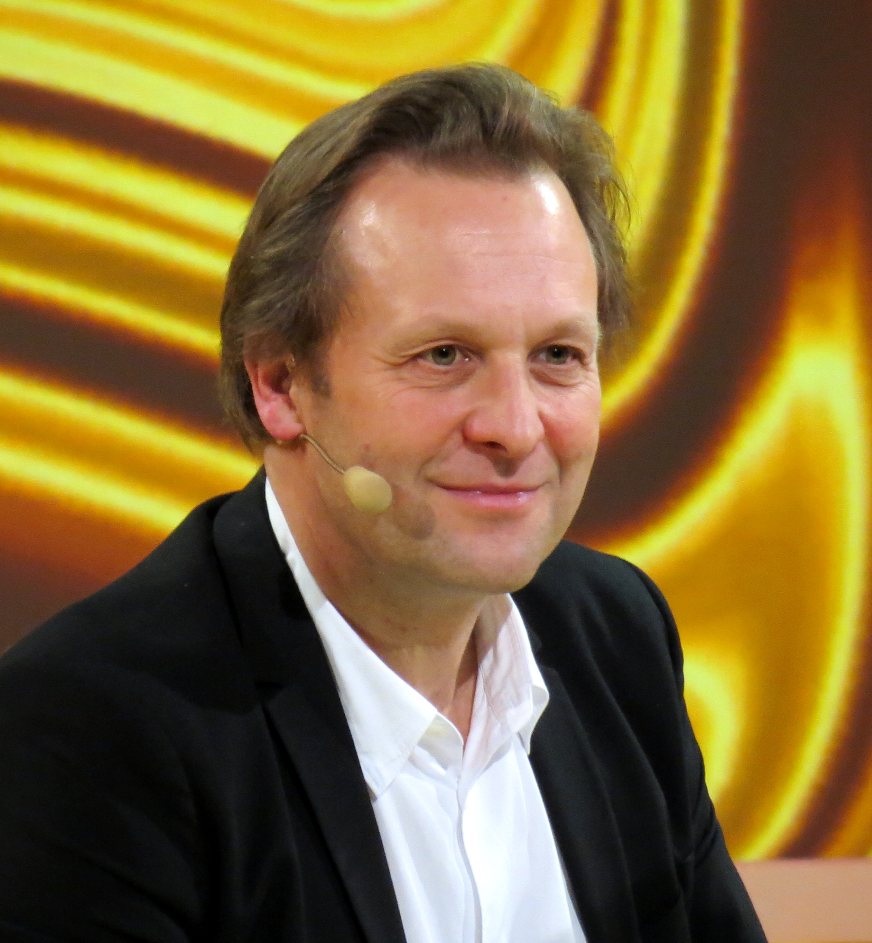 Daniel Birnbaum, chef för Moderna Museet.